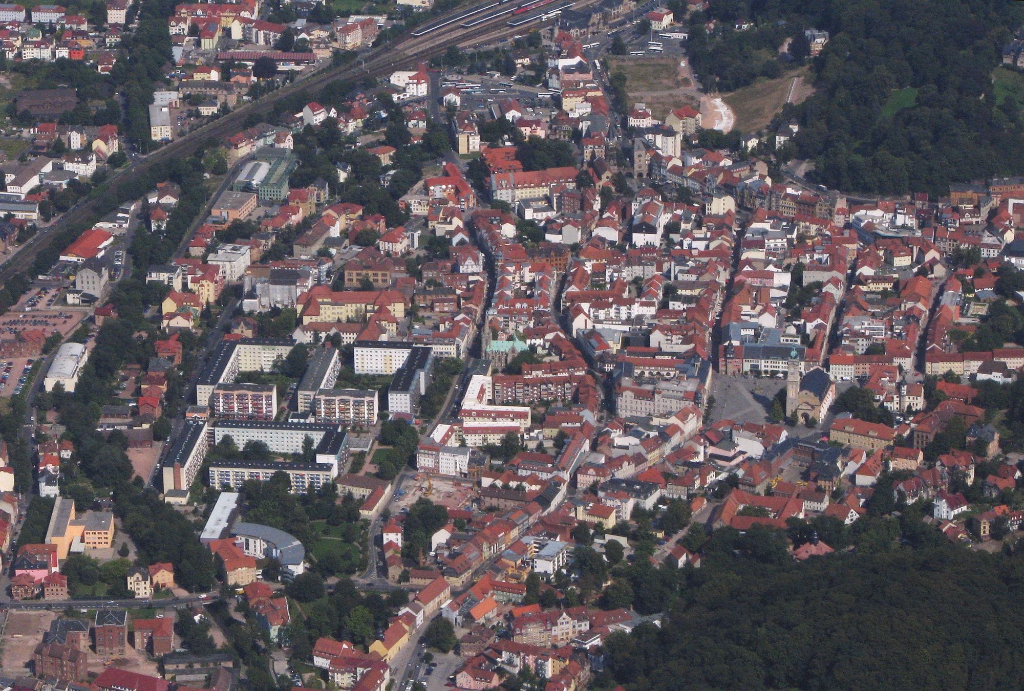 Luftbild der Lutherstadt Eisenach (Thüringen) - Altstadt mit Georgenkirche - Foto 2009 Wolfgang Pehlemann Steinberg Osttsee IMG_0488